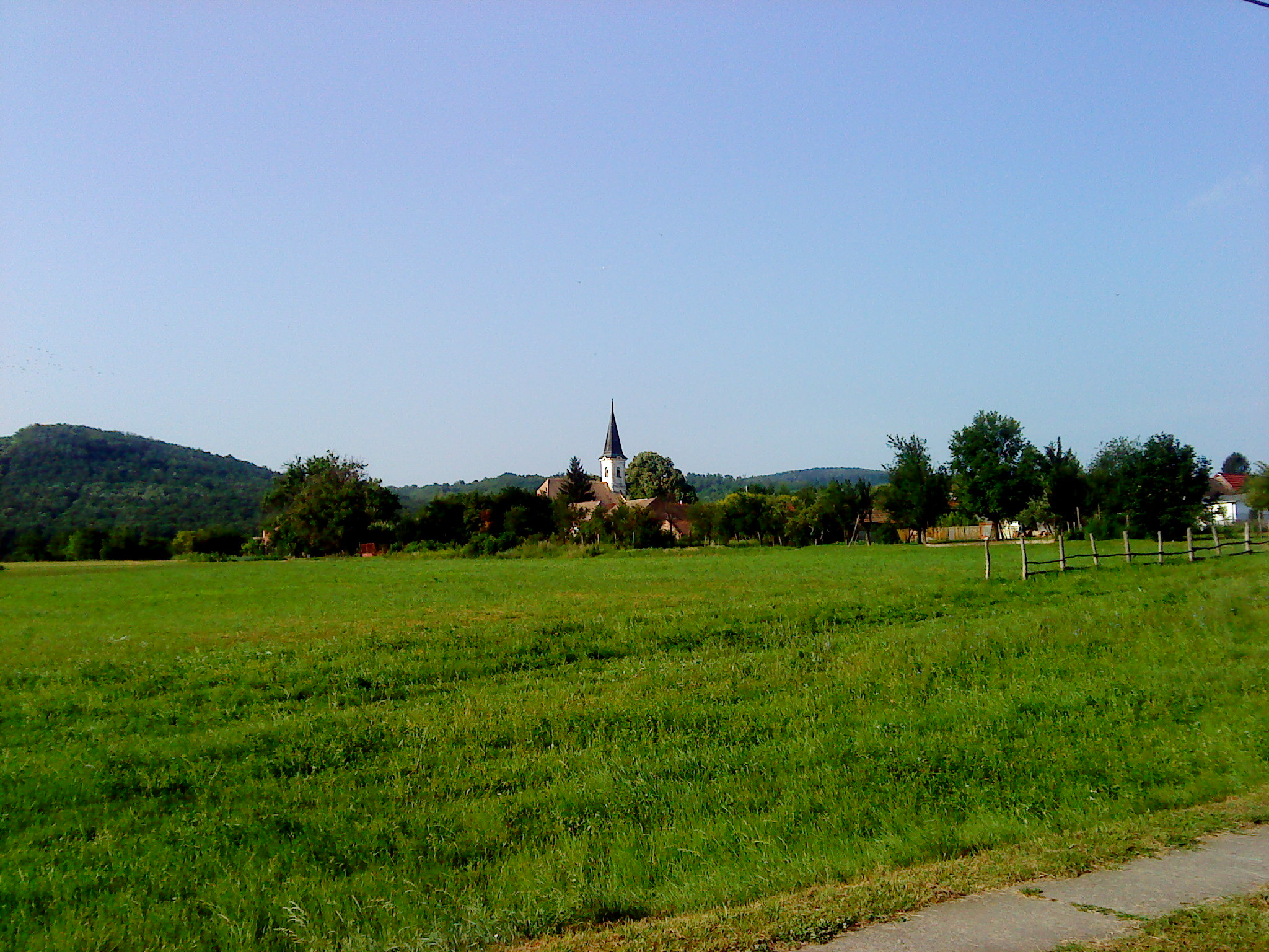 Kistótfalu közepén lévő legelő, református templom